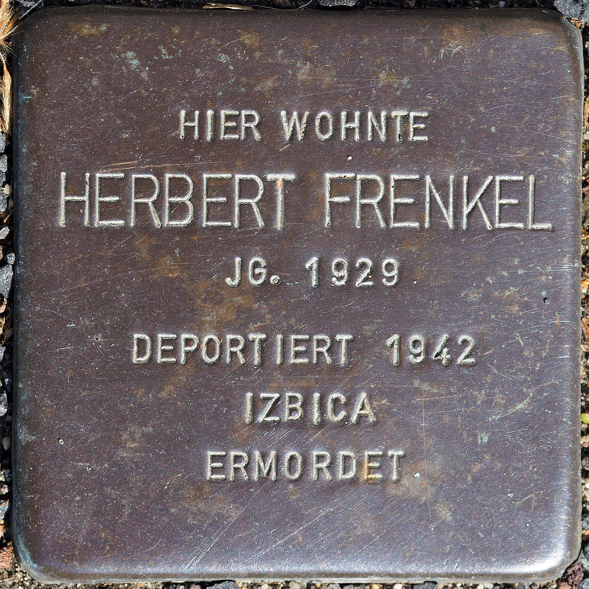 Stolpersteine MG: Frenkel, Herbert